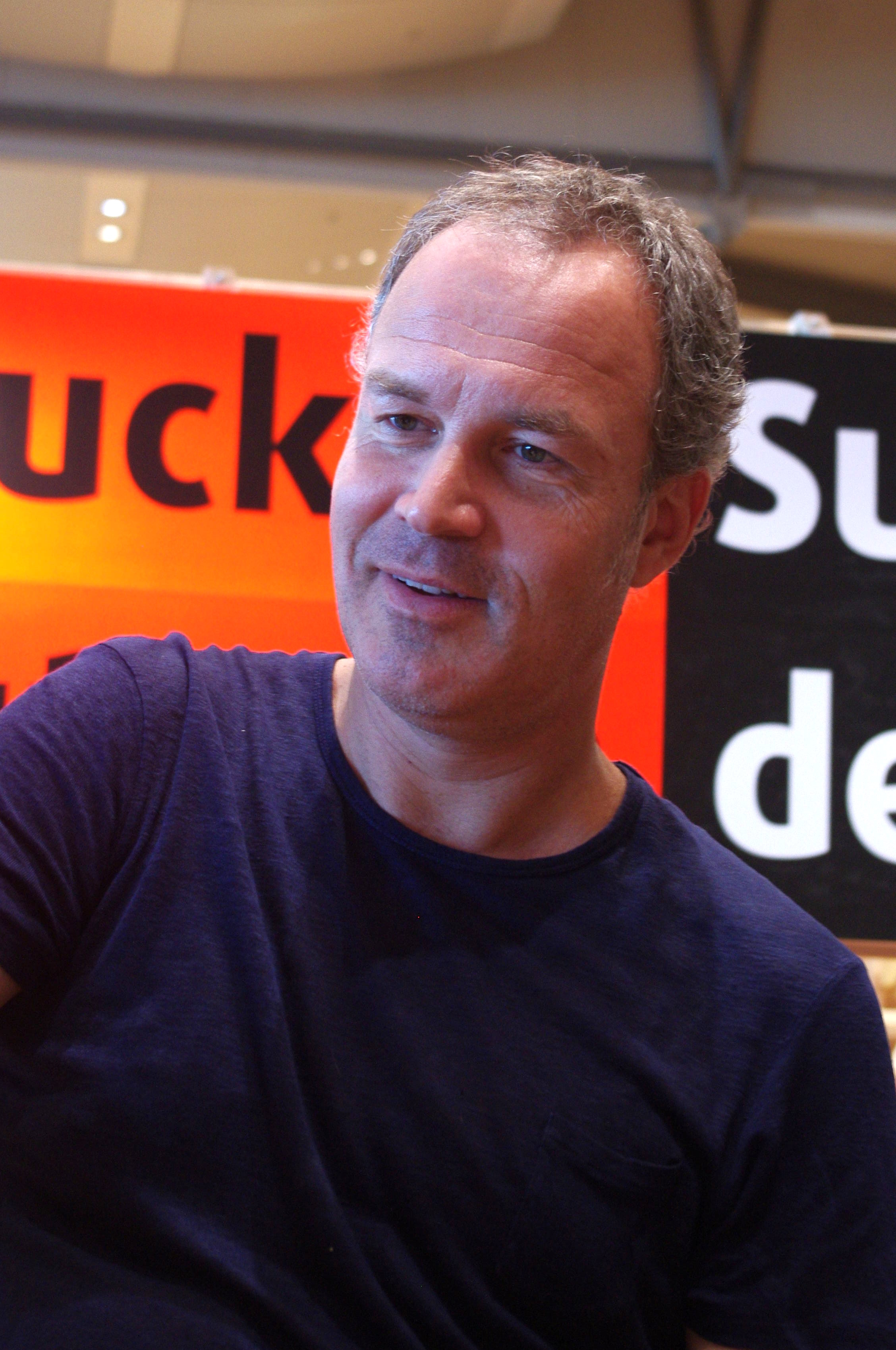 Frankfurter Buchmesse 2017. Zep druckt mit der Gutenbergpresse